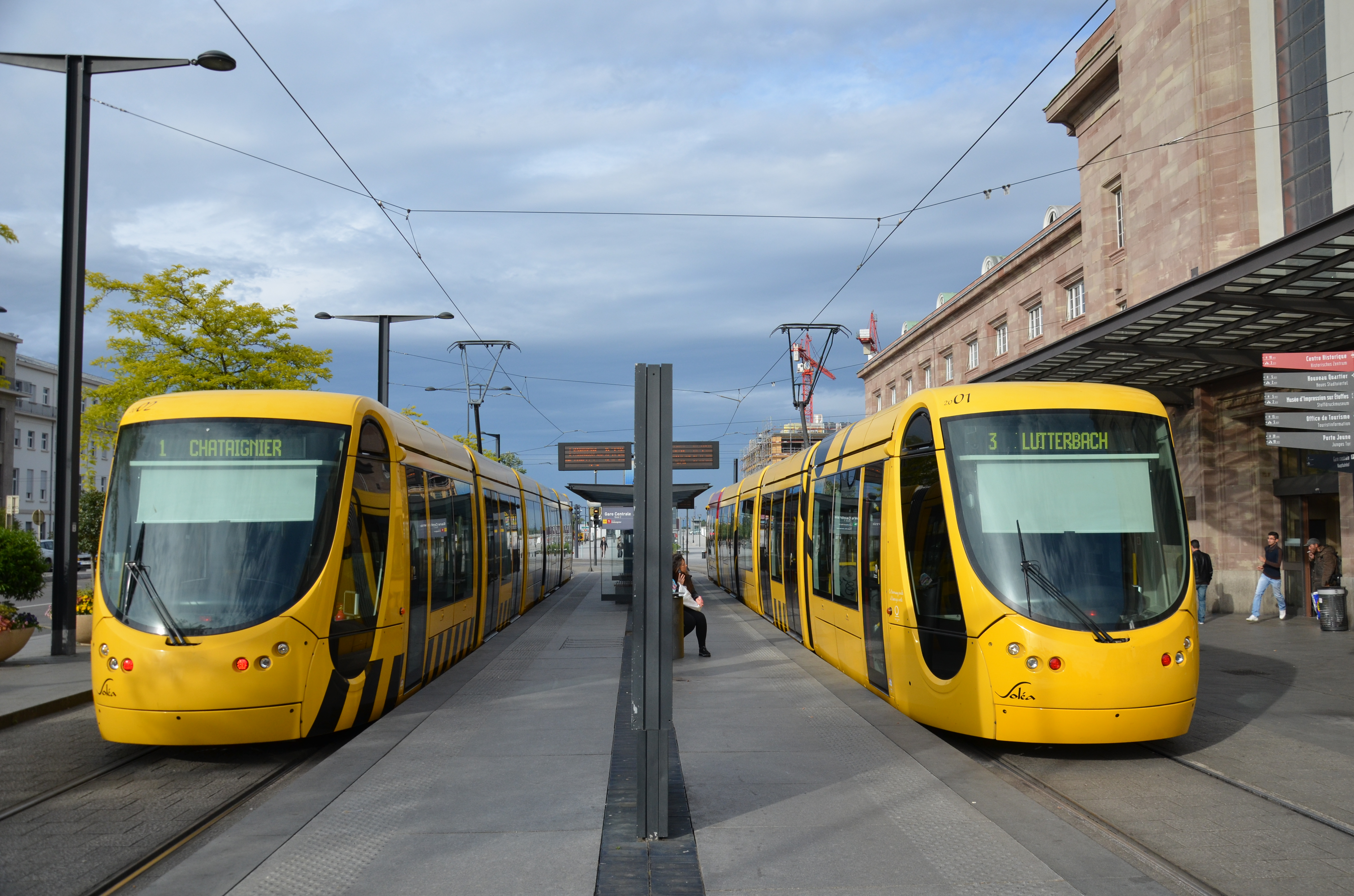 Alstom Citadis 302 n°2002 + 2001 sur les lignes 1 et 3 du réseau SOLEA de Mulhouse, à la station Gare Centrale.